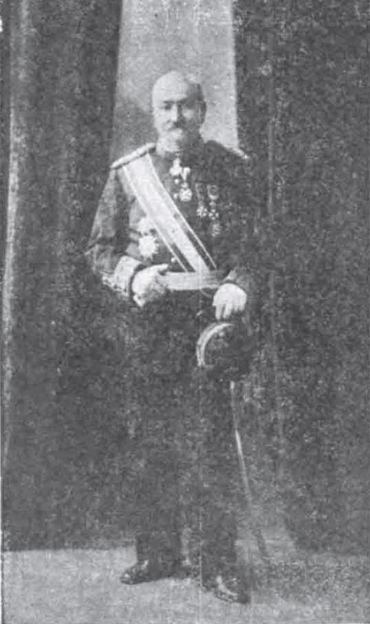 Griechischer Militär